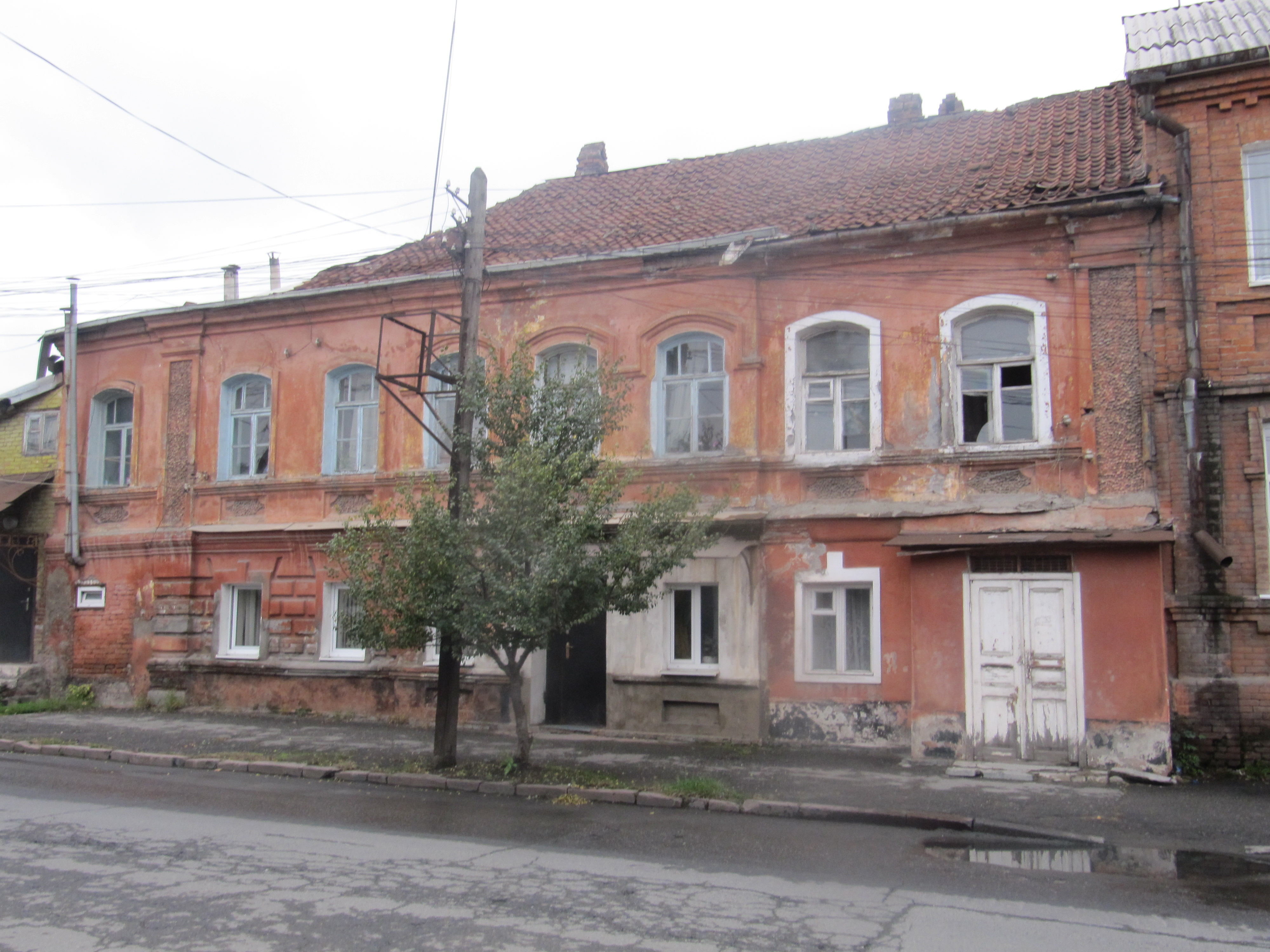 Дом № 40 на улице Гаппо Баева, Владикавказ